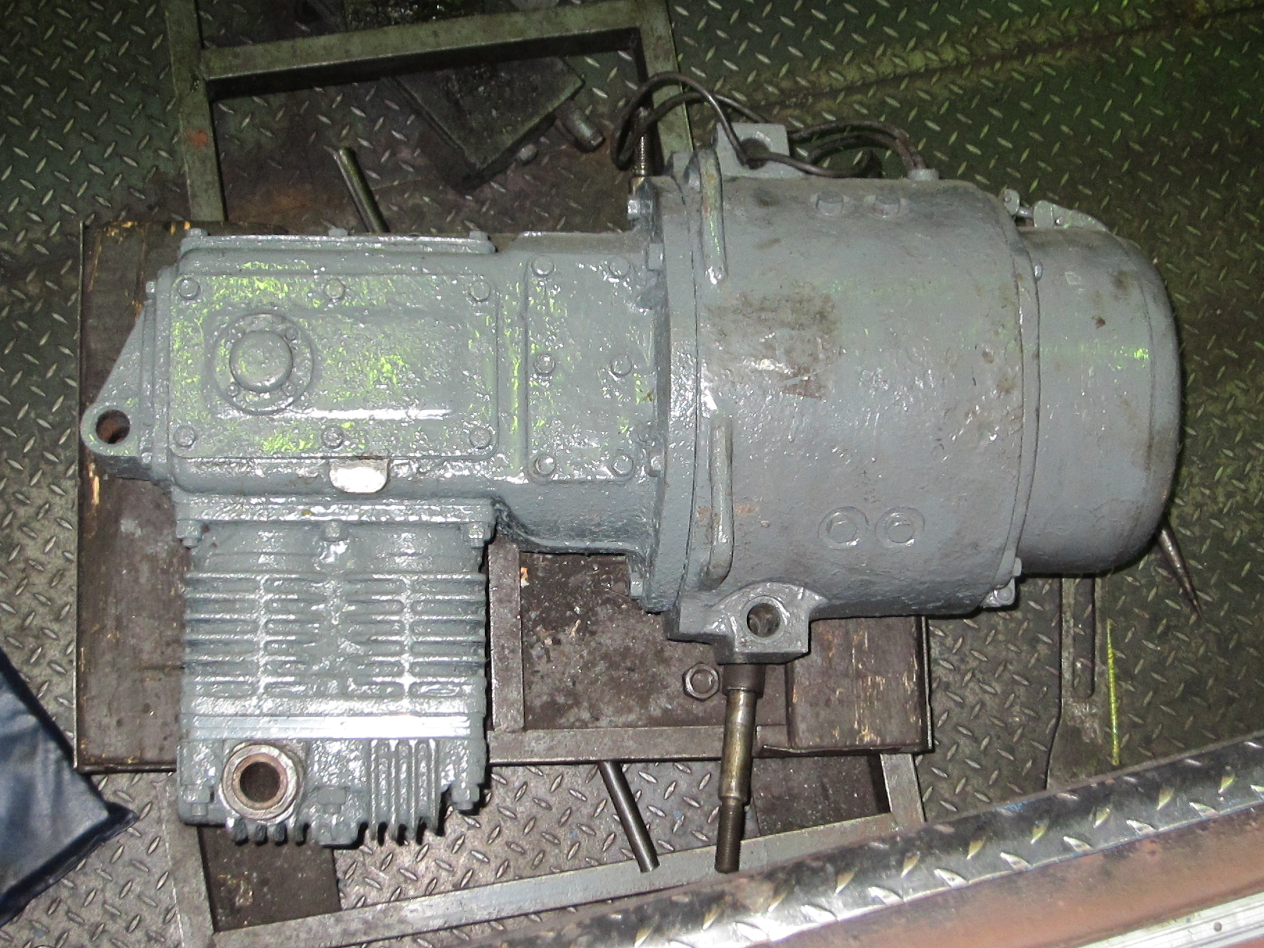 Снятый с вагона мотор-компрессор ЭК-4Б